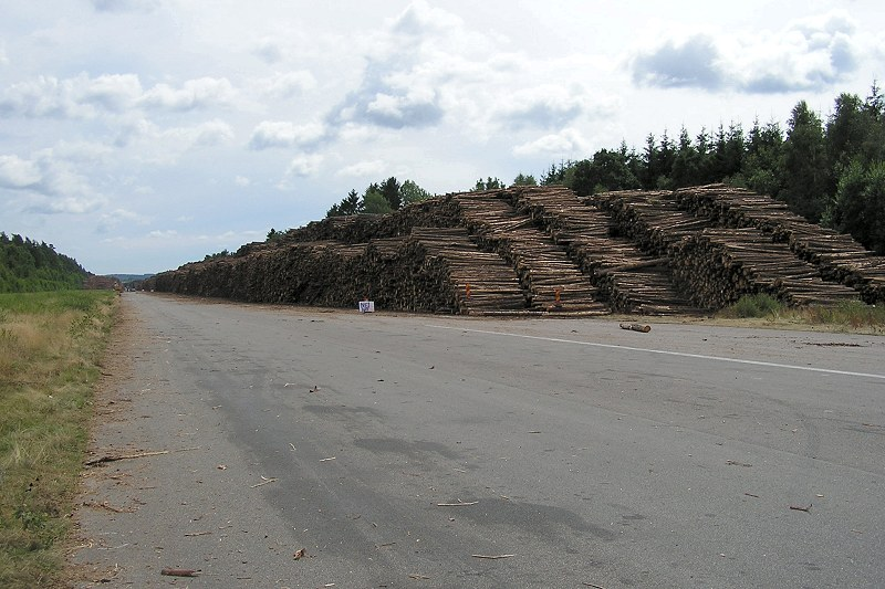 Taget vid norra banänden sommaren 2005. Arbete med att lagra massaved på det f.d. flygfältet pågår.